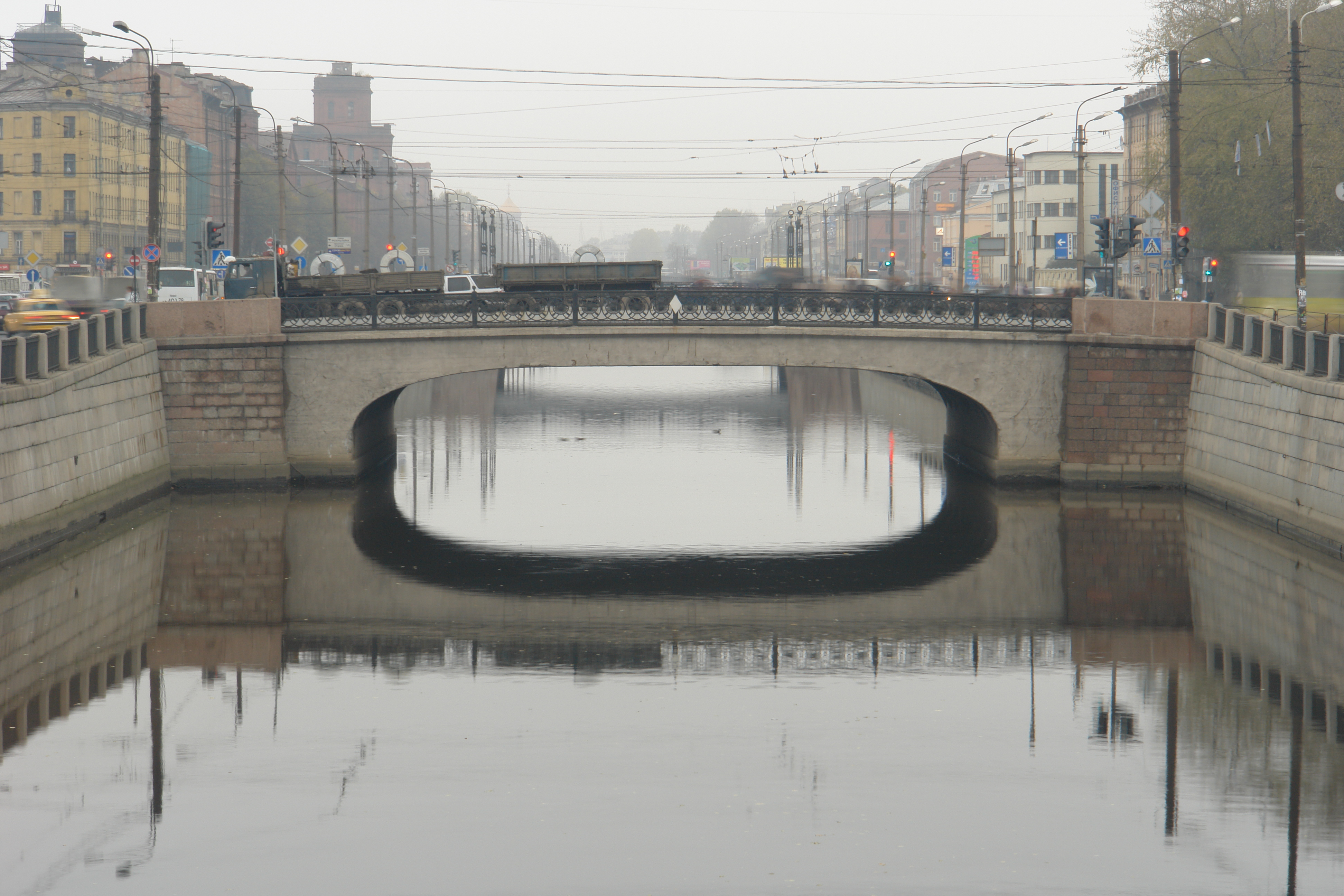 Новопетергофский мост (Вид с Балтийского пешеходного моста)